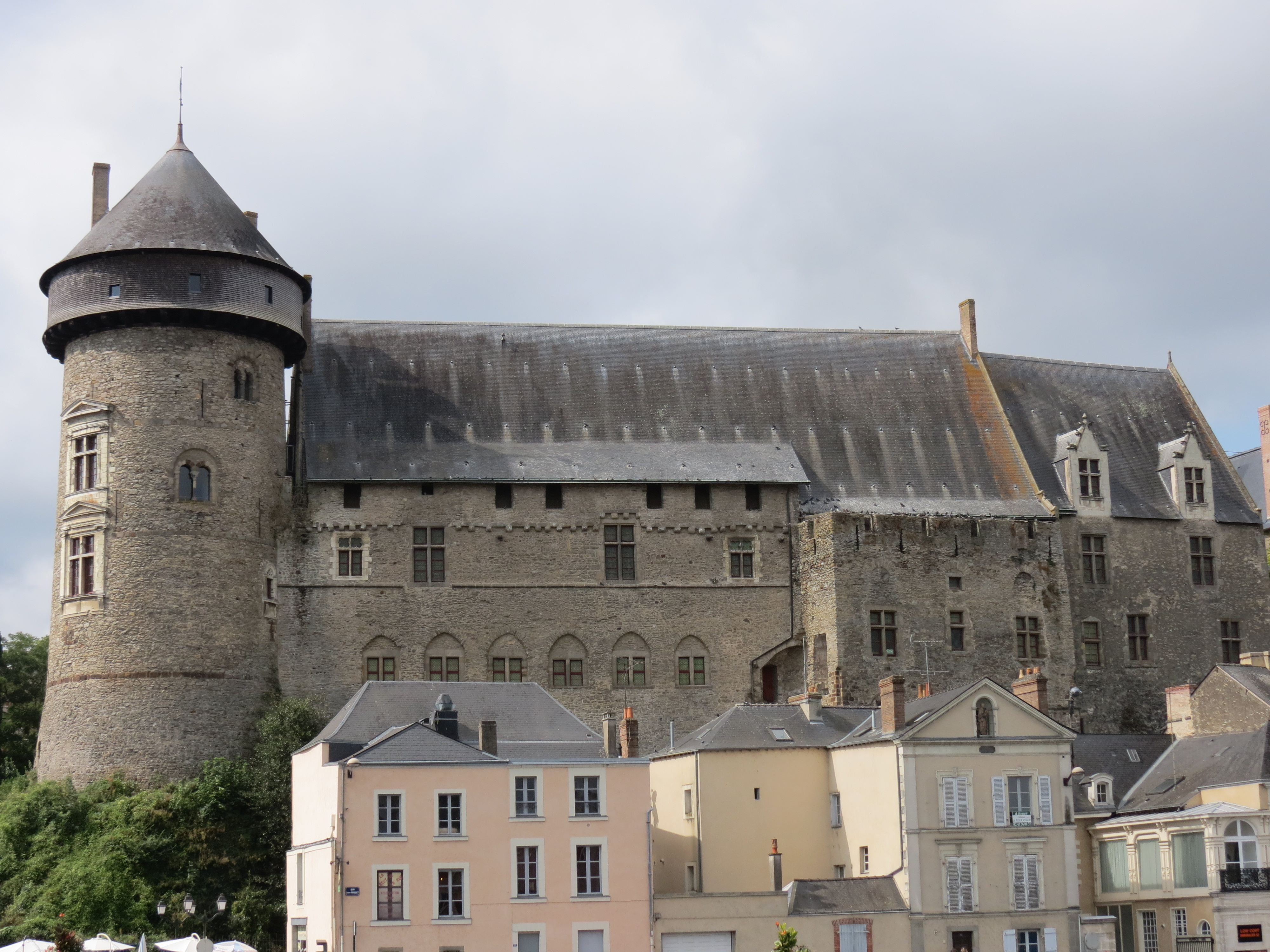 Château, Laval, Mayenne, Pays de la Loire.